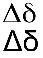 greek letter delta